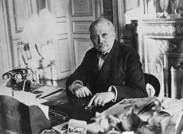 Portrait de M. Nicolle, ministre de la Santé Publique : photographie de presse